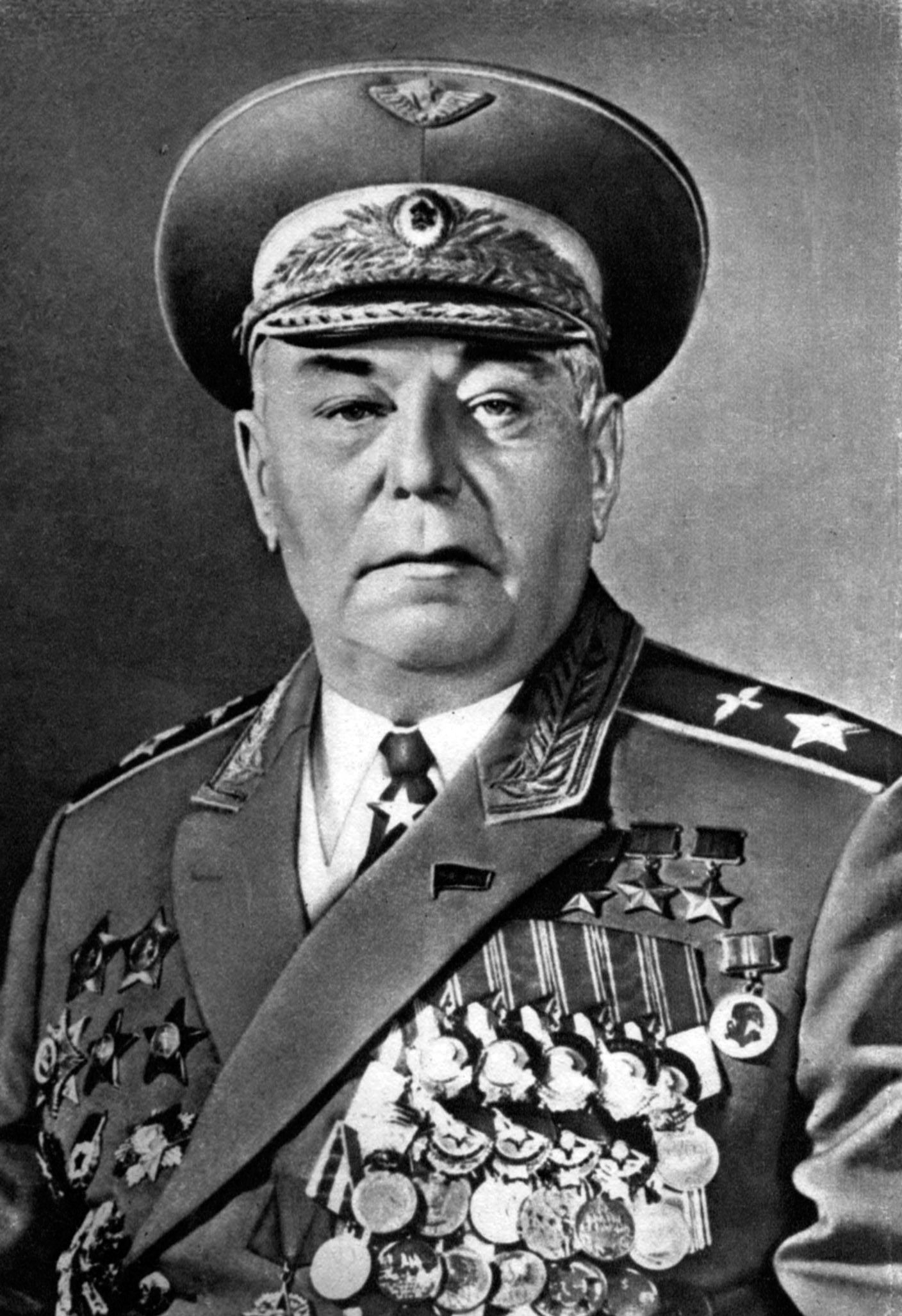 Александр Иванович Покрышкин (1913 — 1985 ) — советский военачальник, Маршал авиации (1972), лётчик-ас.